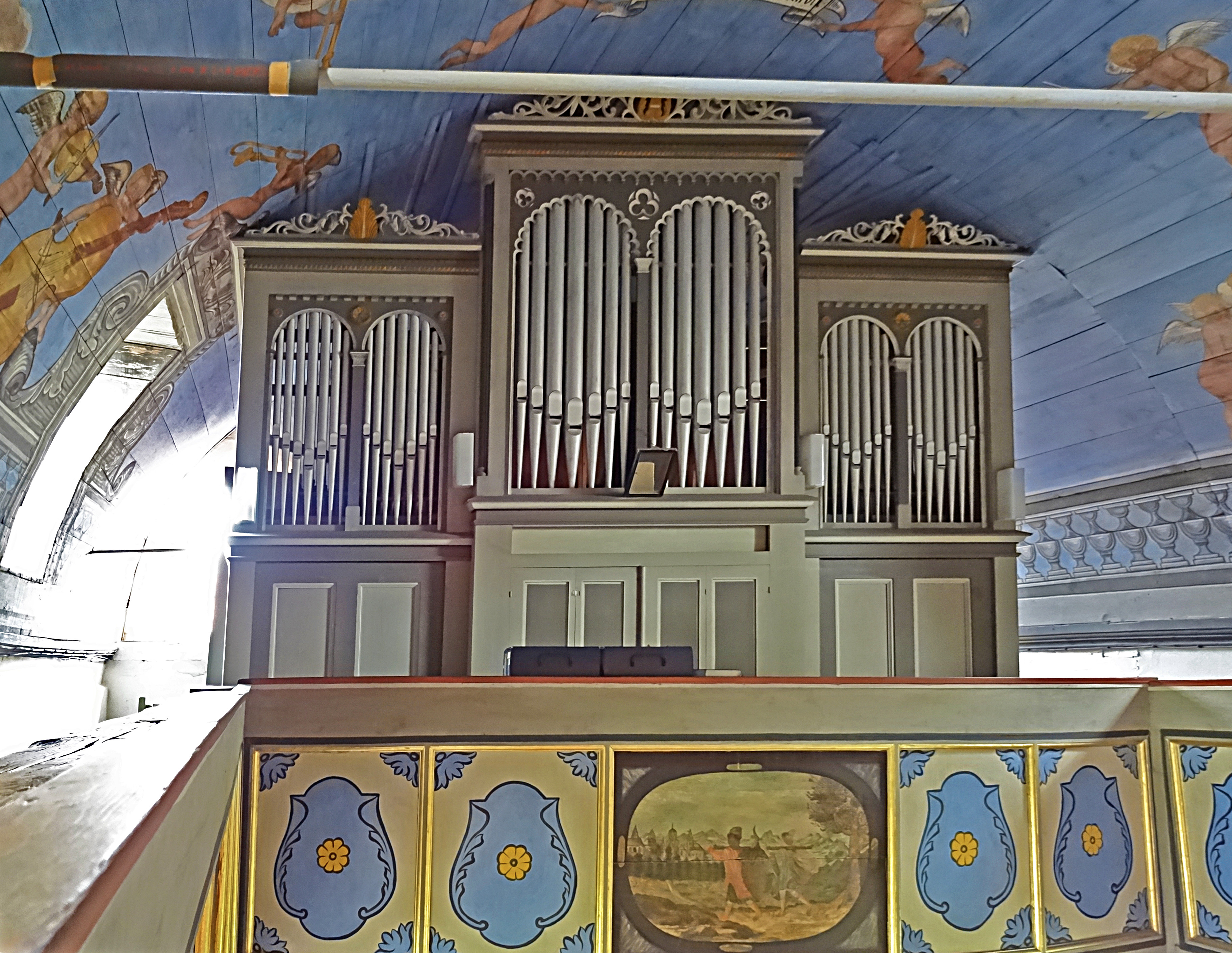 Orgel von Carl Loesche (Rudolstadt 1875, II/P 12) in der Dorfkirche St. Michael (Großkochberg)